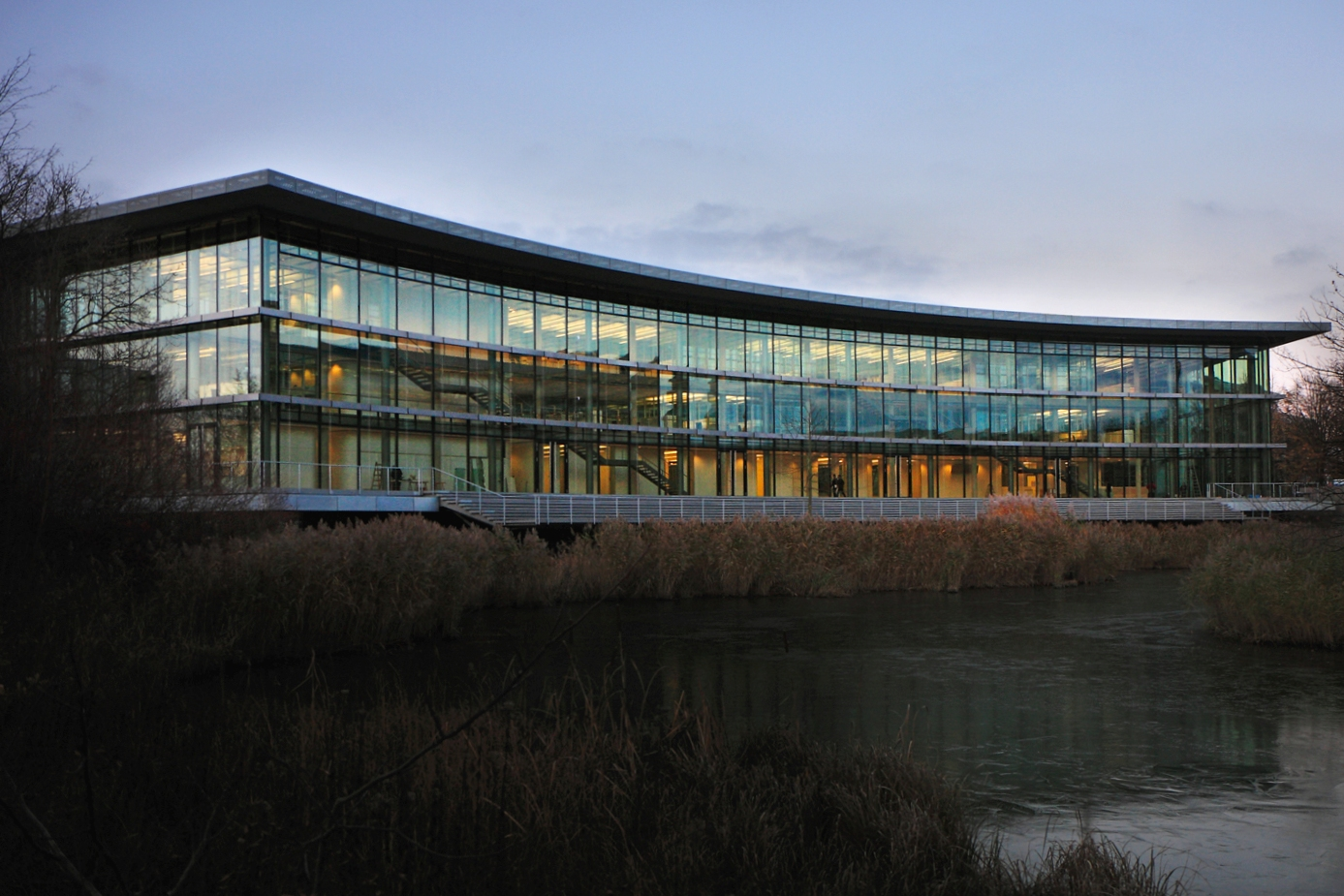 Oeconomicum der Heinrich-Heine-Universität (Ansicht vom Universitätsteich aus)